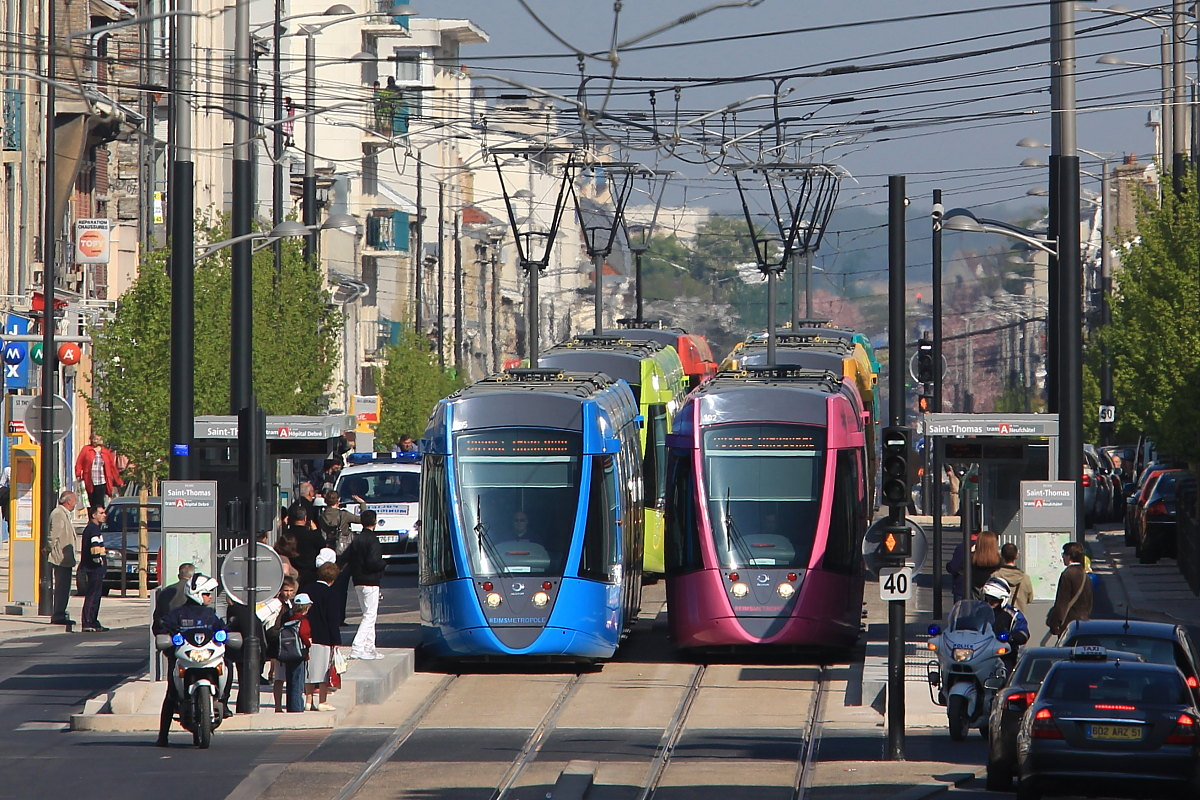 Six tramway circulent en parallèle sur deux voies, à Reims, à l'occasion de l'inauguration, arrêt st-Thomas, avenue de Laon.